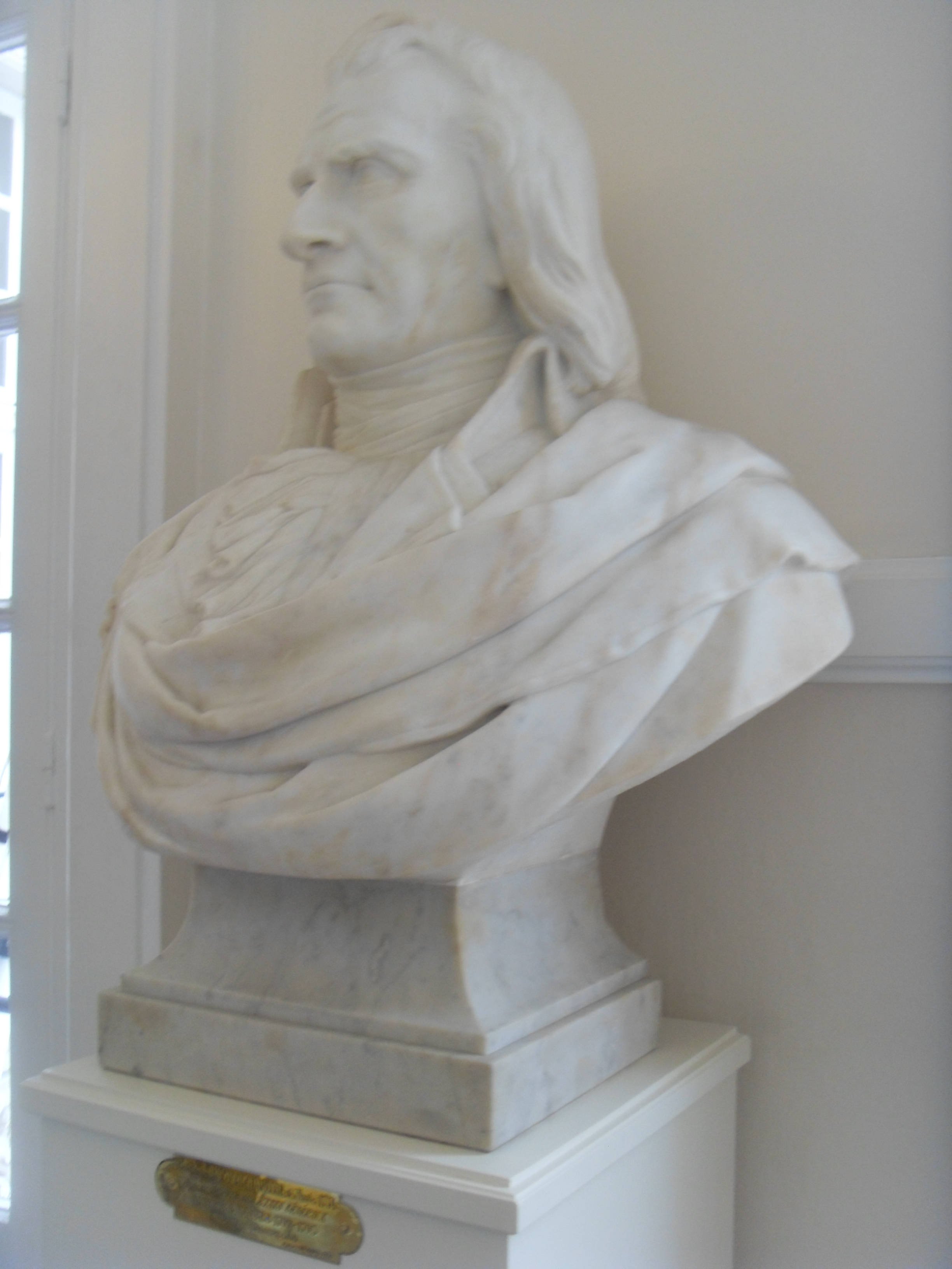 Buste mairie Nantes (René Gaston Baco de La Chapelle ?)